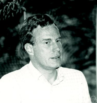 Foto di Mark Ronan